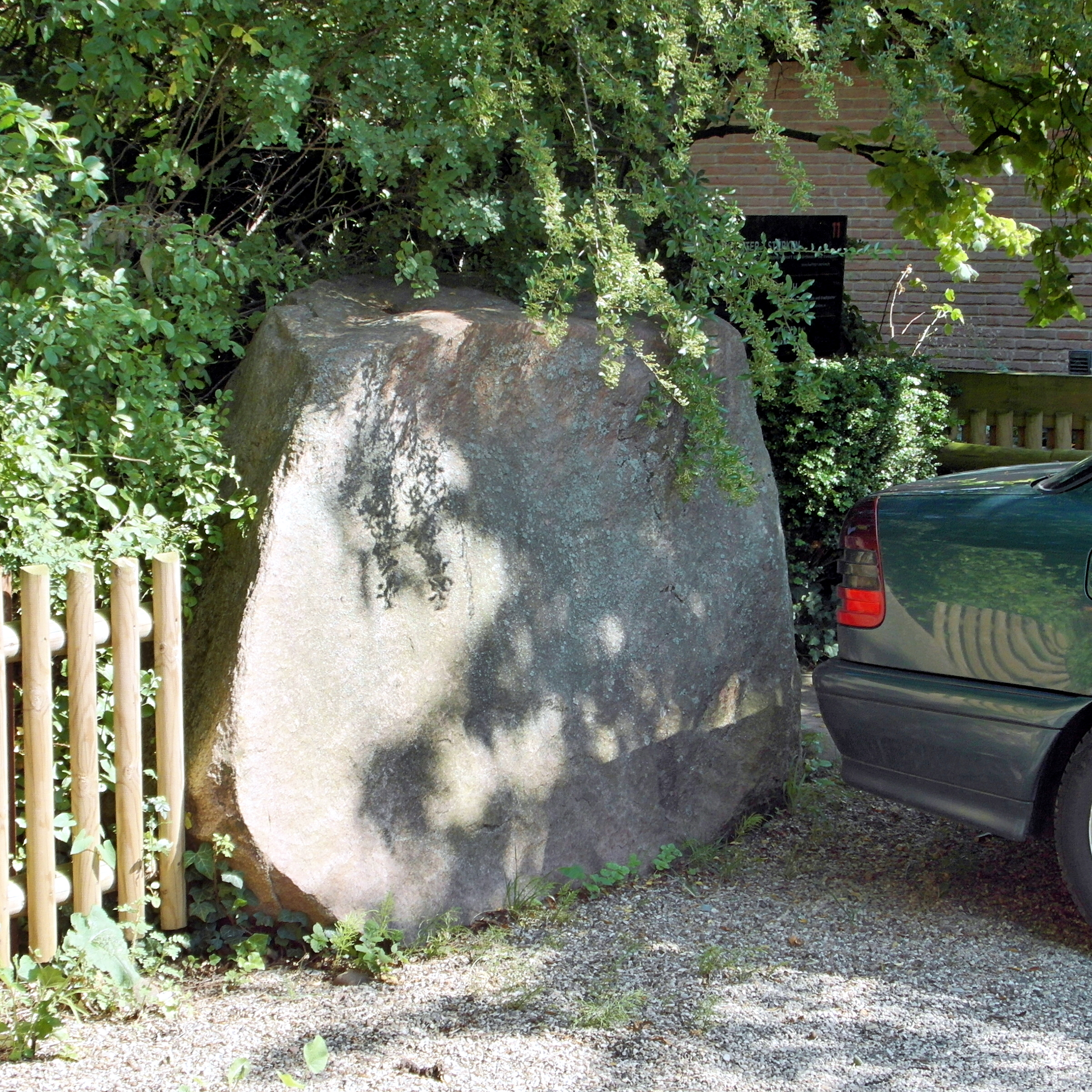 Findling auf dem Grundstück Tessenowweg 11. Roter Granit. Der Windschliffstein wird wegen seiner Seltenheit als Naturdenkmal (ND-H 227) geschützt (Findlinge über 5 t Gewicht sind selten) Der Findling ist zugleich als Geotop (Geotop-Nr. 3624/02) registriert.